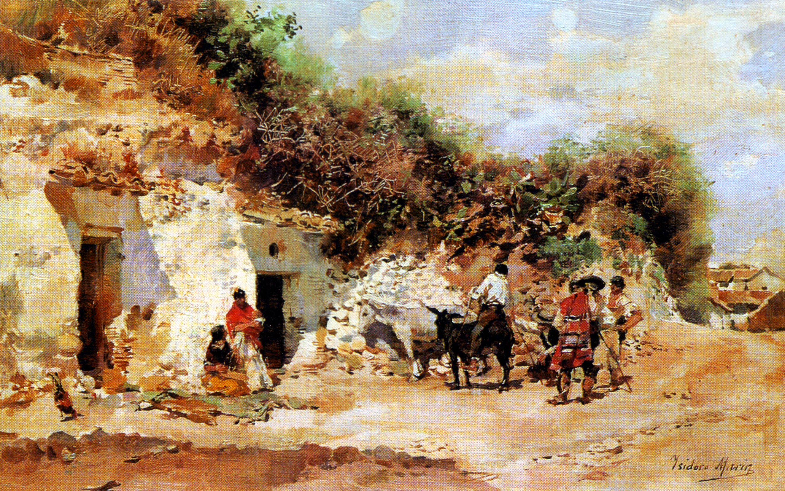 El trato